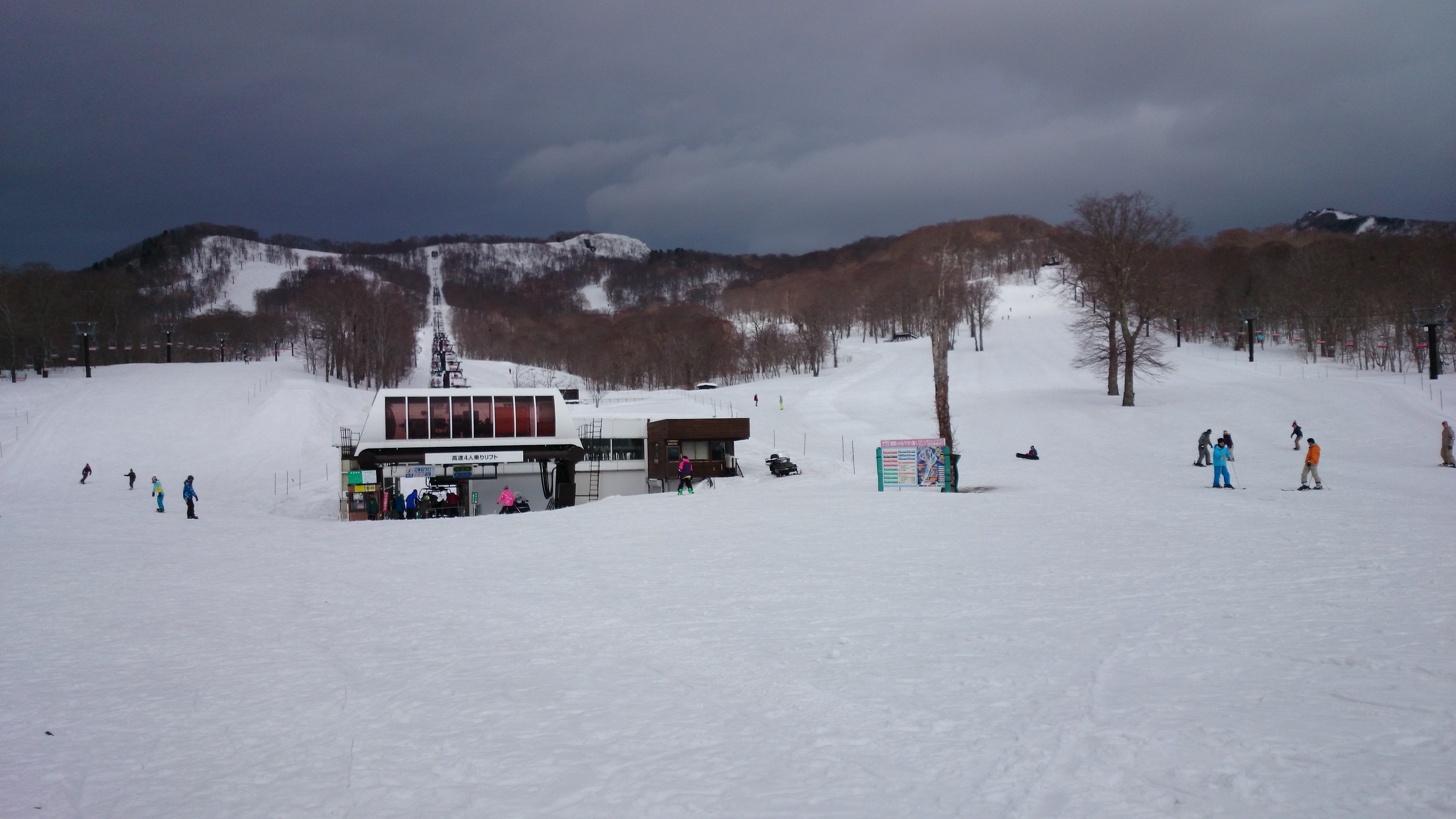 たんばらスキーパーク麓の光景